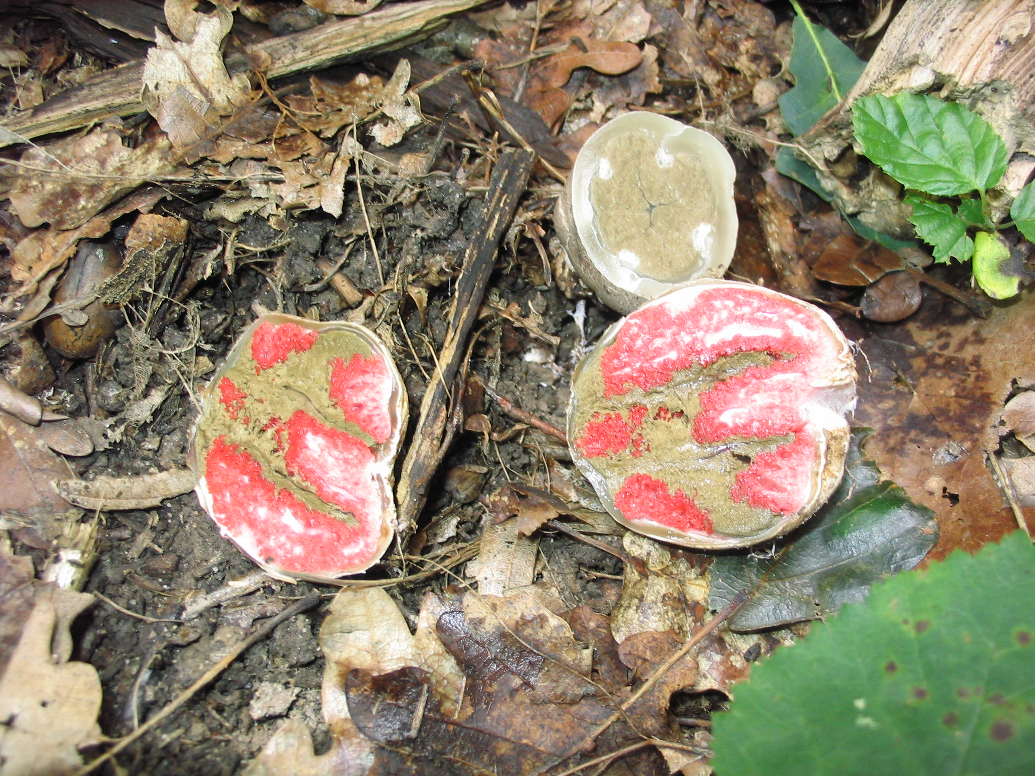 Aufgeschnittene Hexeneier des Tintenfischpilzes, Clathrus archeri, aufgenommen im Ober-Olmer Wald bei Mainz am 12.07.2008 von Dr. Hagen Graebner